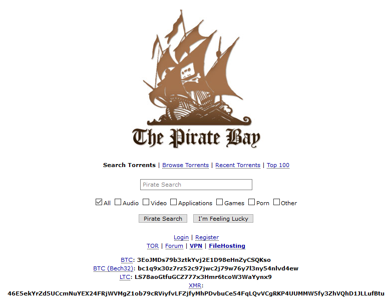 Capture d’écran 2020-05-01 du site web